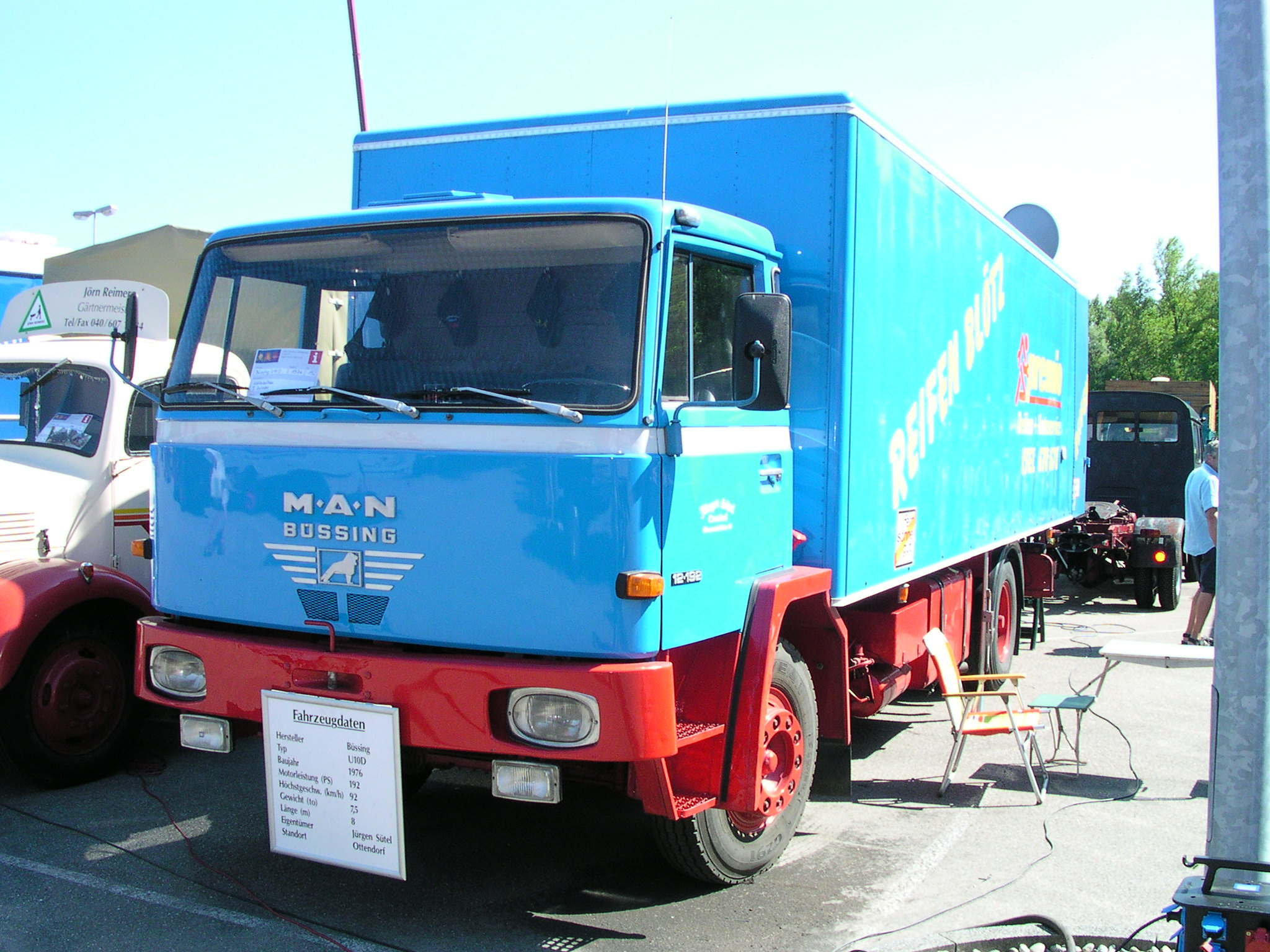 großes Oldtimertreffen im Mercedes-Werk in Wörth am Rhein 2006